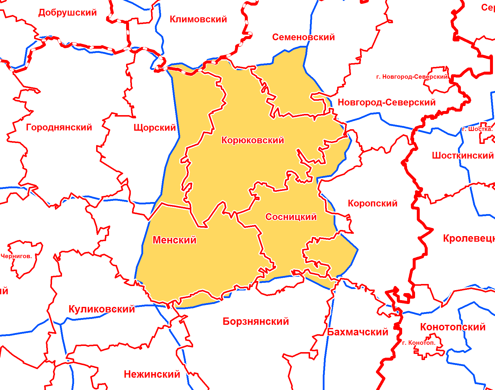 Сосницкий уезд Черниговской губернии в современной сетке районов